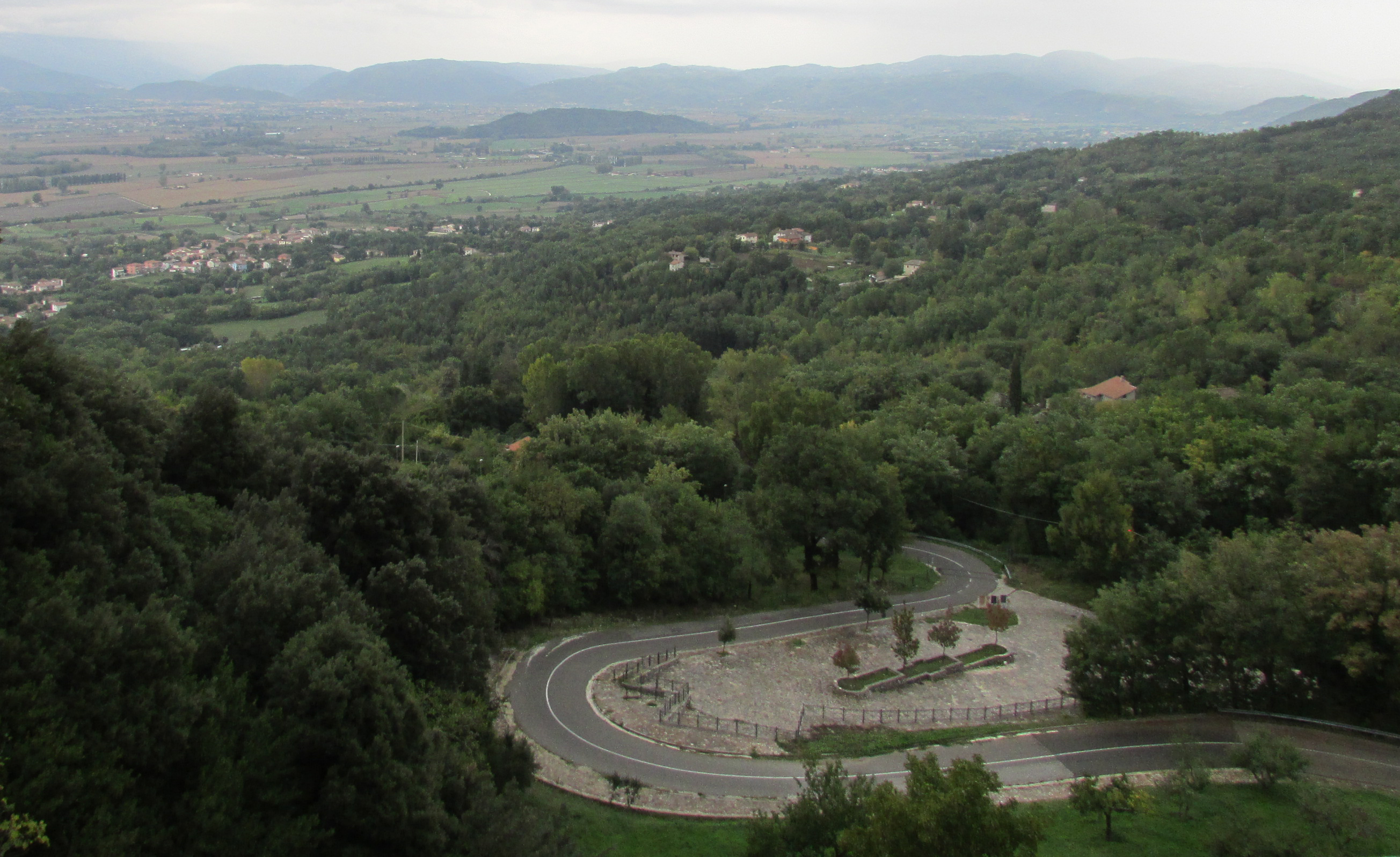 La strada provinciale 1/c che collega Greccio a Sellecchia (provincia di Rieti), fotografata dal Santuario di Greccio